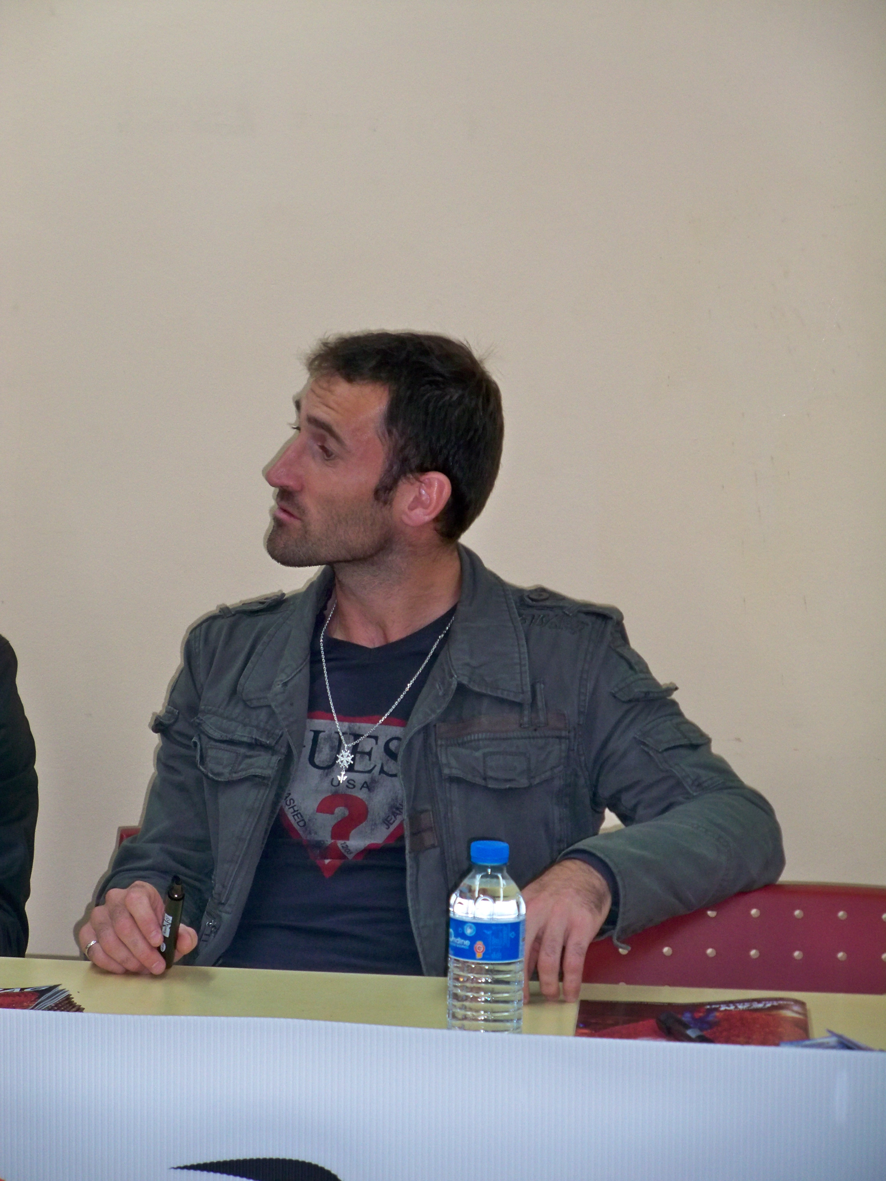 Florian Jarjat lors d'une séance de dédicace organisé par l'ESTAC à l'Intermarché de Saint-Julien-les-Villas.